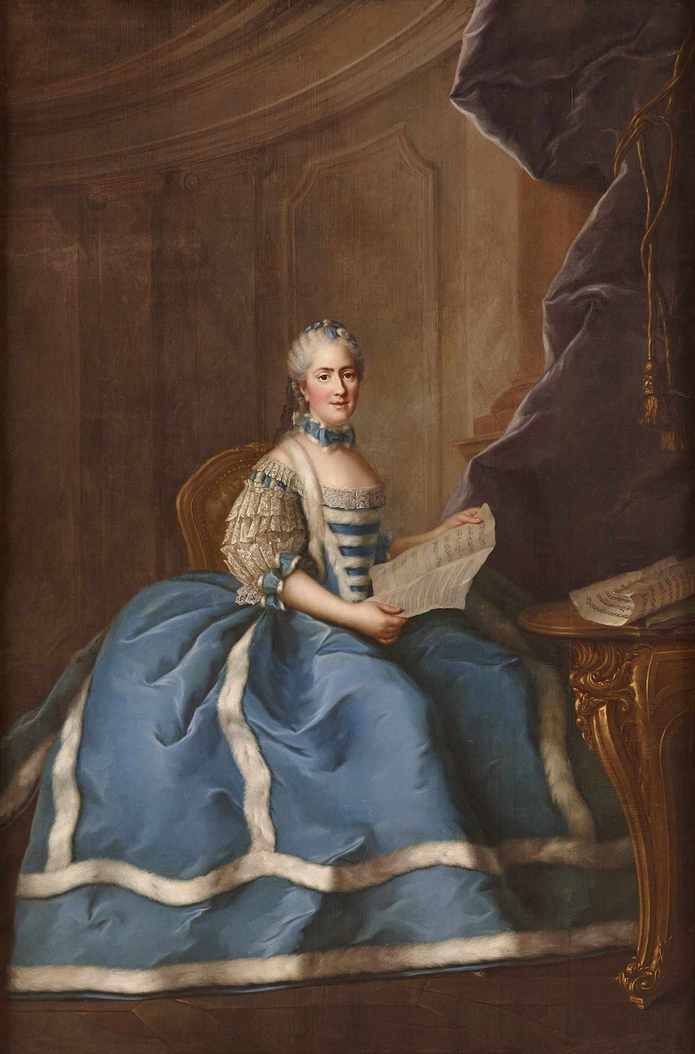 Sophie-Philippine-Elisabeth-Justine de France, dite Madame Sophie (1744-1782)